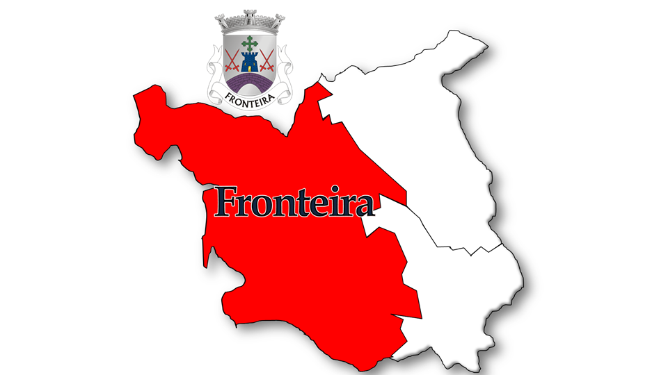 Evolução da População